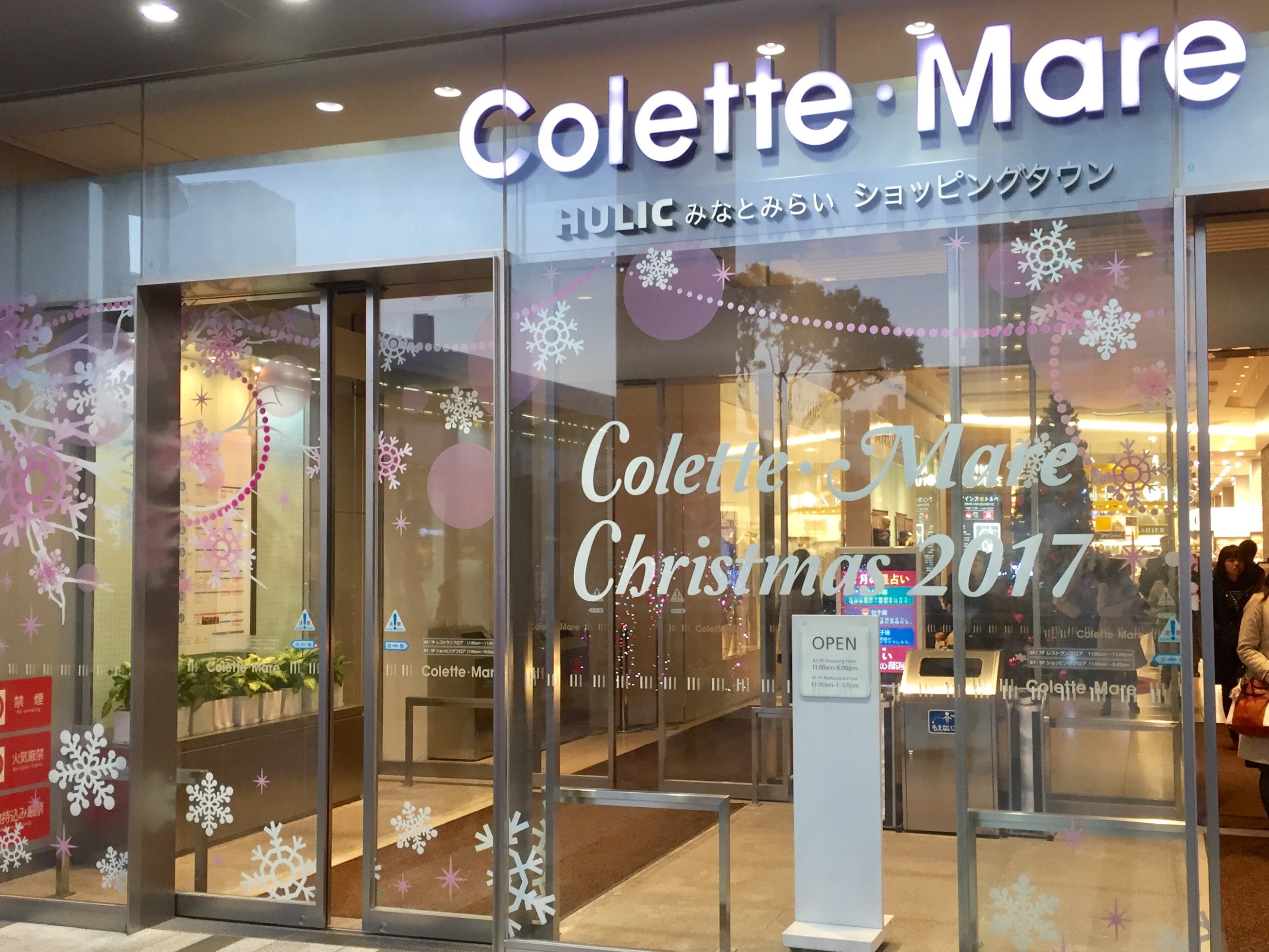 ヒューリックみなとみらい内にあるショッピングエリア「コレットマーレ (Colette・Mare)」。なお、建物の名称は2017年12月にTOCみなとみらいから「ヒューリックみなとみらい」に改称された。